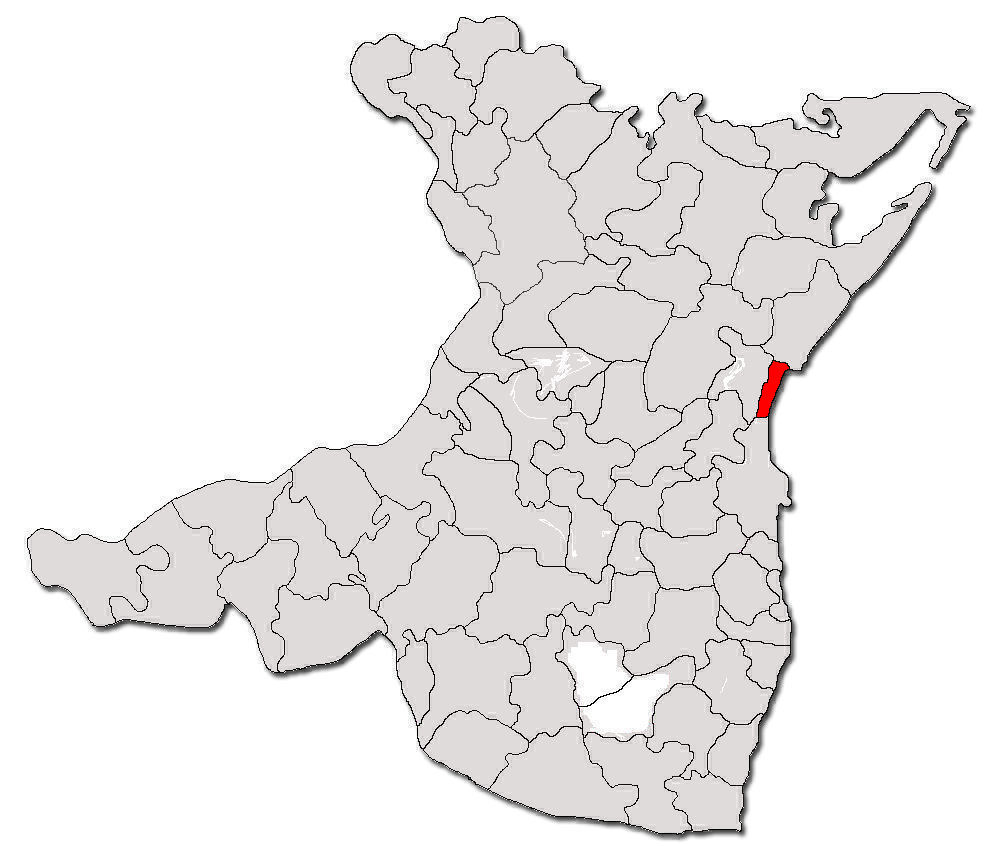 Categorie:Hărţi ale judeţului Constanţa